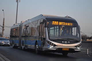 有浙江金华青年客车厂生产的BJD-WG180N，双源无轨电车